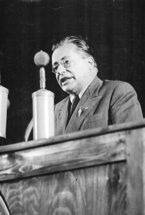 III.Parteitag der SED vom 20.-24.7.1950. Vom 20.-22.7.1950 findet in Berlin in der Werner-Seelenbinder-Halle der III.Parteitag der Sozialistischen Einheitspartei statt. UBz:Palmiro Togliatti, Generalsekretär der KPI, spricht. Zentralbild-Quasch. 96 7294-50 23.7.50 Bod. Information added by Wikimedia users. Palmiro Togliatti, segretario el PCI, parla a Berlino il 23 luglio 1950.